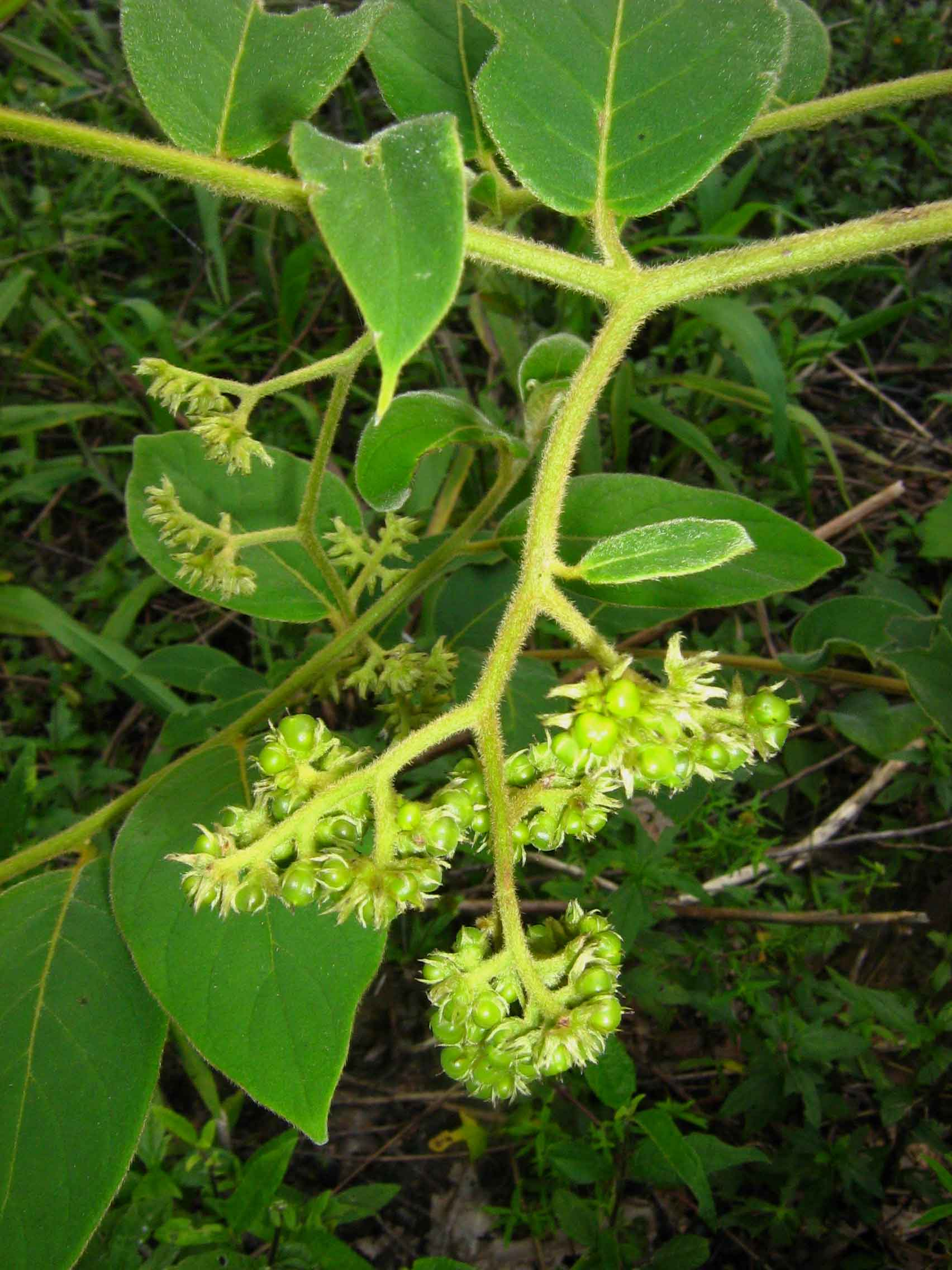 Tournefortia villosa Salzm. ex DC.